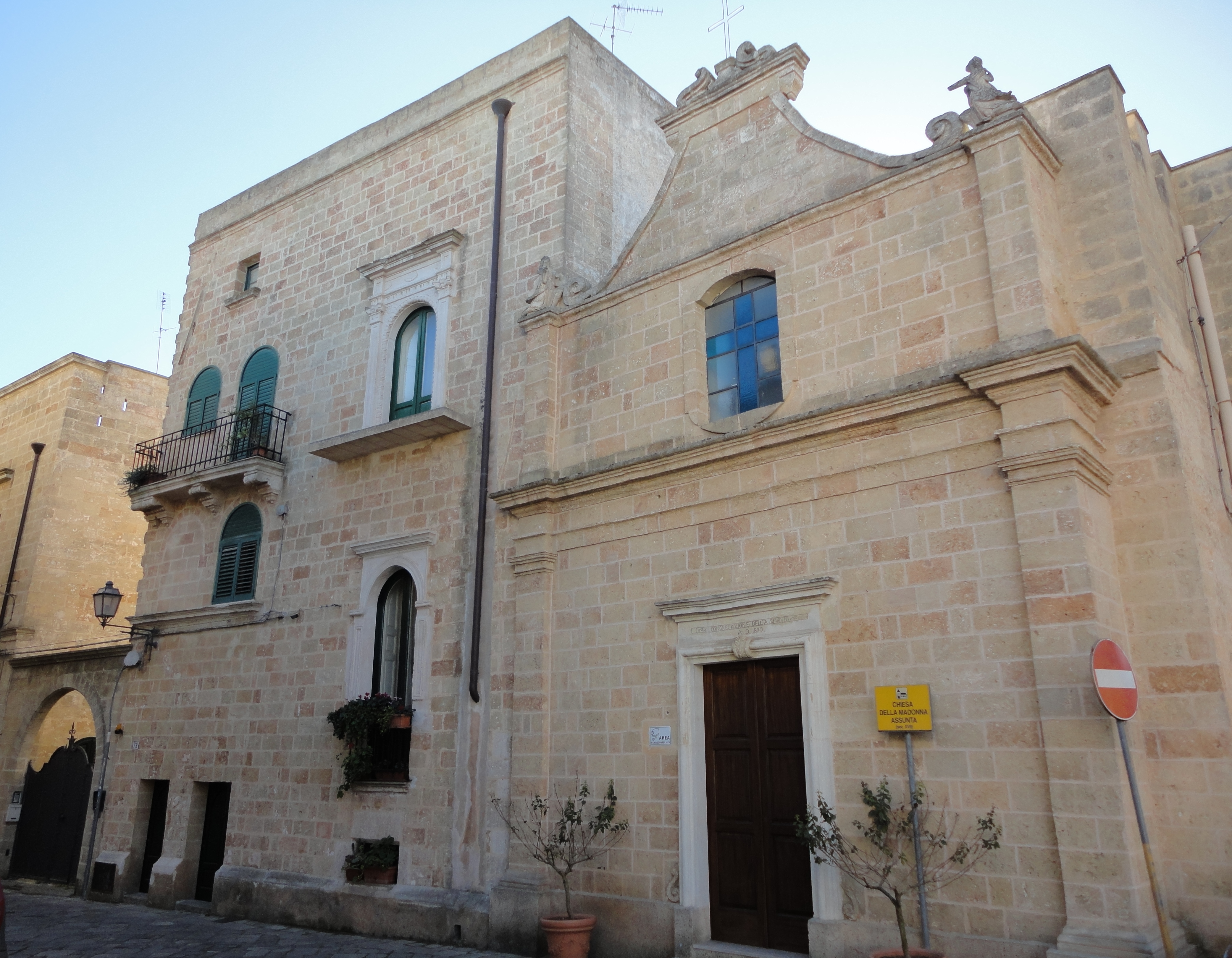 Chiesa Madonna Assunta Alessano, Lecce